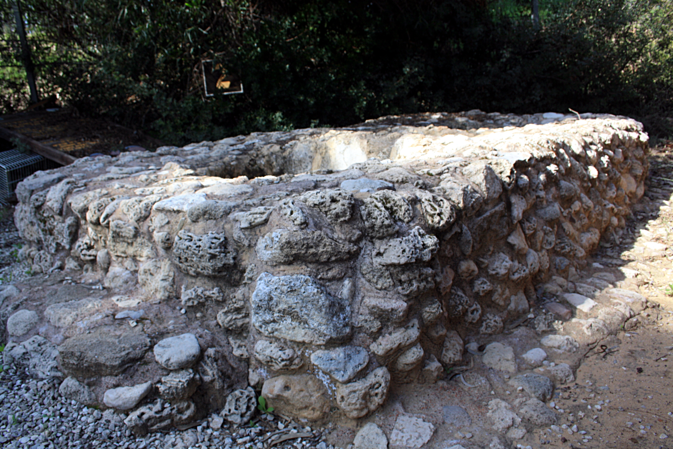 גת מתקופת הברזל II בגן הגתות, ראשון לציון.